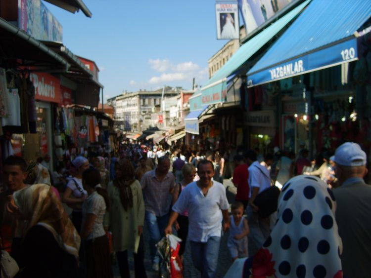 Mahmutpaşa, İstanbul